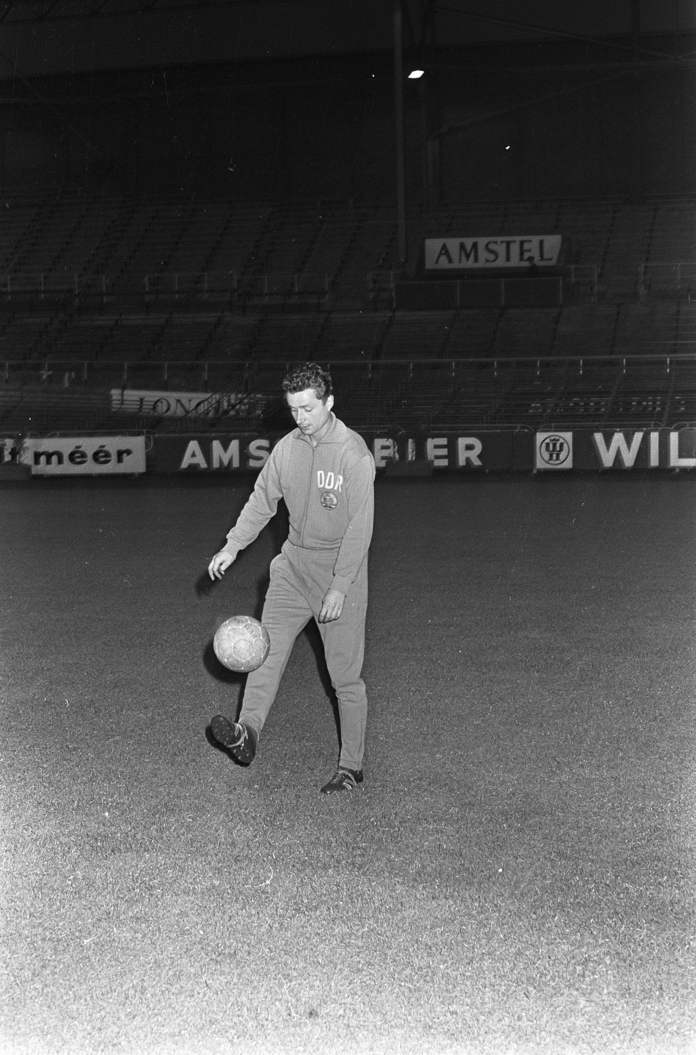 Collectie / Archief : Fotocollectie Anefo Reportage / Serie : [ onbekend ] Beschrijving : Training Oost-Duitsers in Olympisch Stadion . Erler tijdens training Datum : 12 september 1967 Trefwoorden : sport, voetbal Instellingsnaam : Olympisch Stadion Fotograaf : Steinmeier, Hans / Anefo Auteursrechthebbende : Nationaal Archief Materiaalsoort : Negatief (zwart/wit) Nummer archiefinventaris : bekijk toegang 2.24.01.05 Bestanddeelnummer : 920-6957